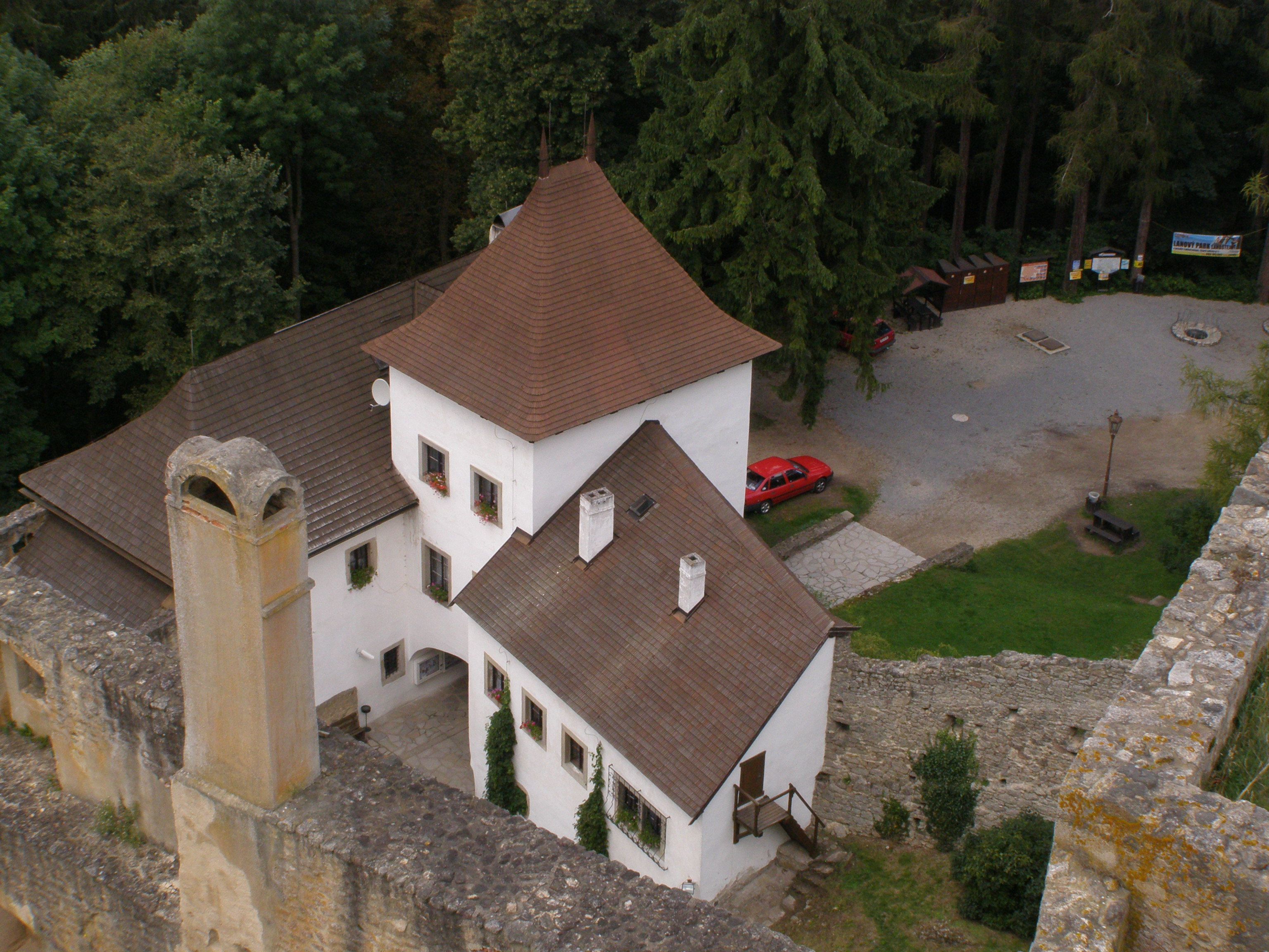 Staré Město pod Landštejnem, hrad Landštejn, pohled z věže na první hradní bránu